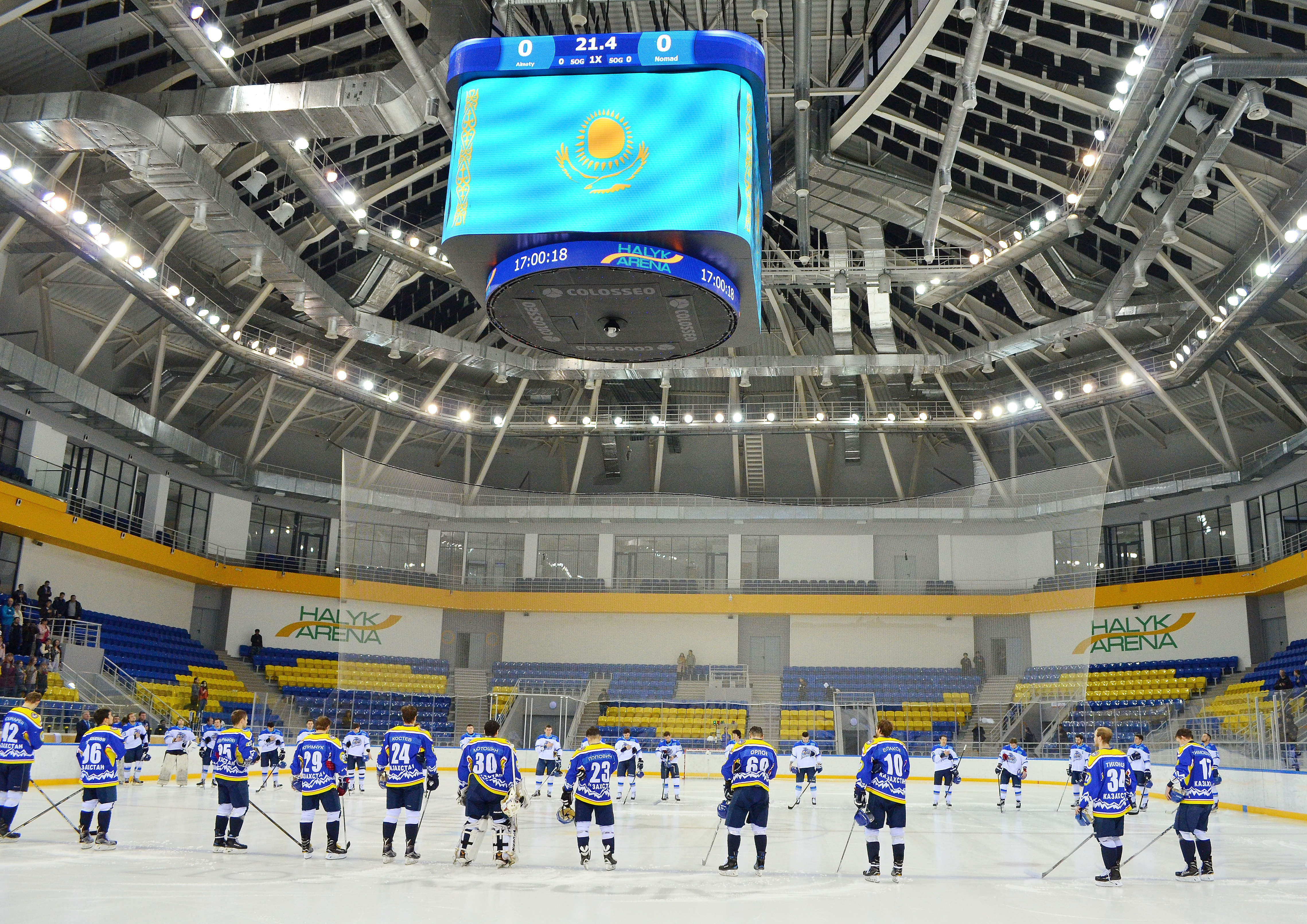 Халык Арена (матч с ХК Номад)